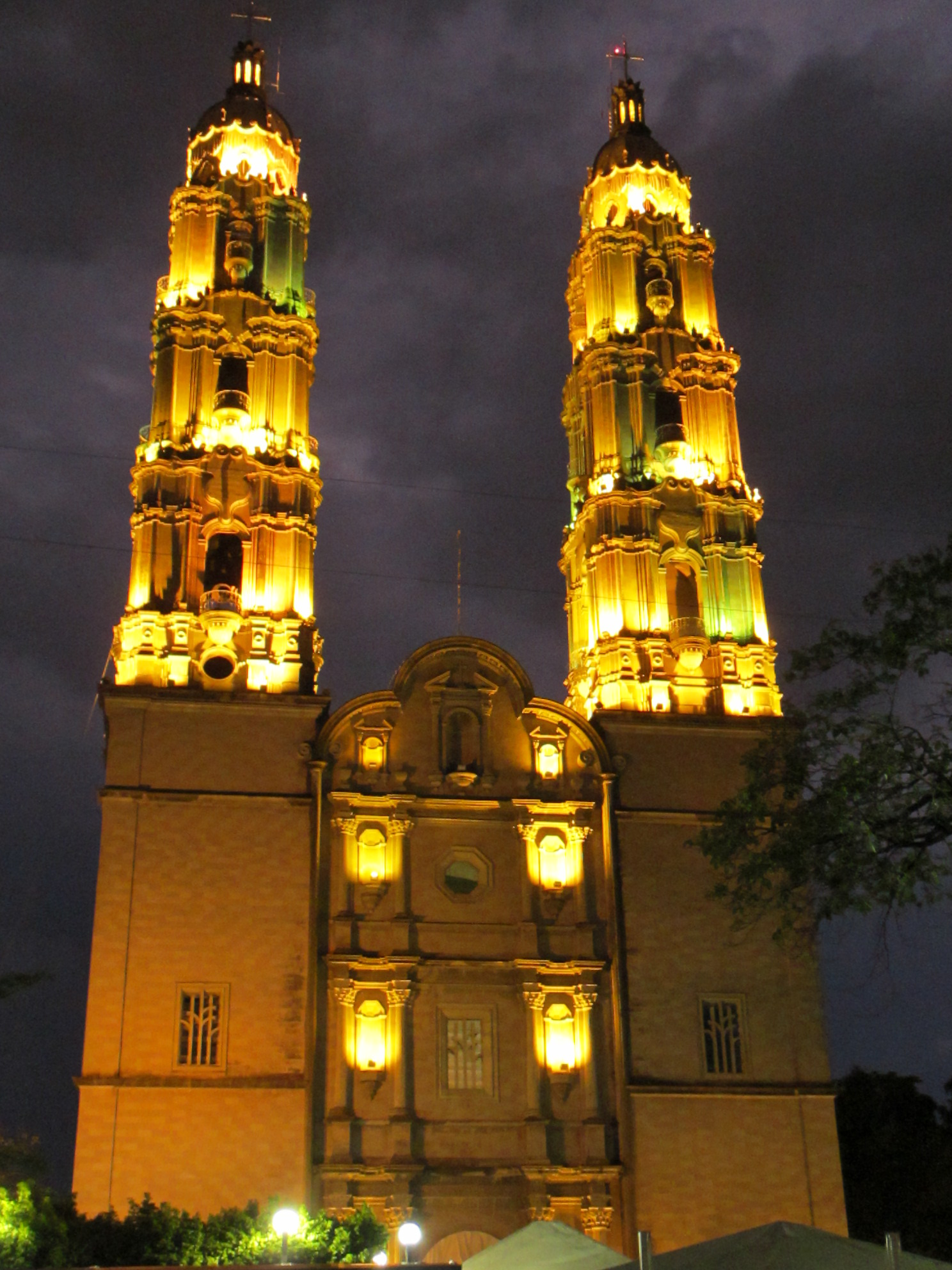 Catedral de Villahermosa, Tabasco, México. Iluminada en una noche de relámpagos durante los festejos de la fundación de la ciudad.